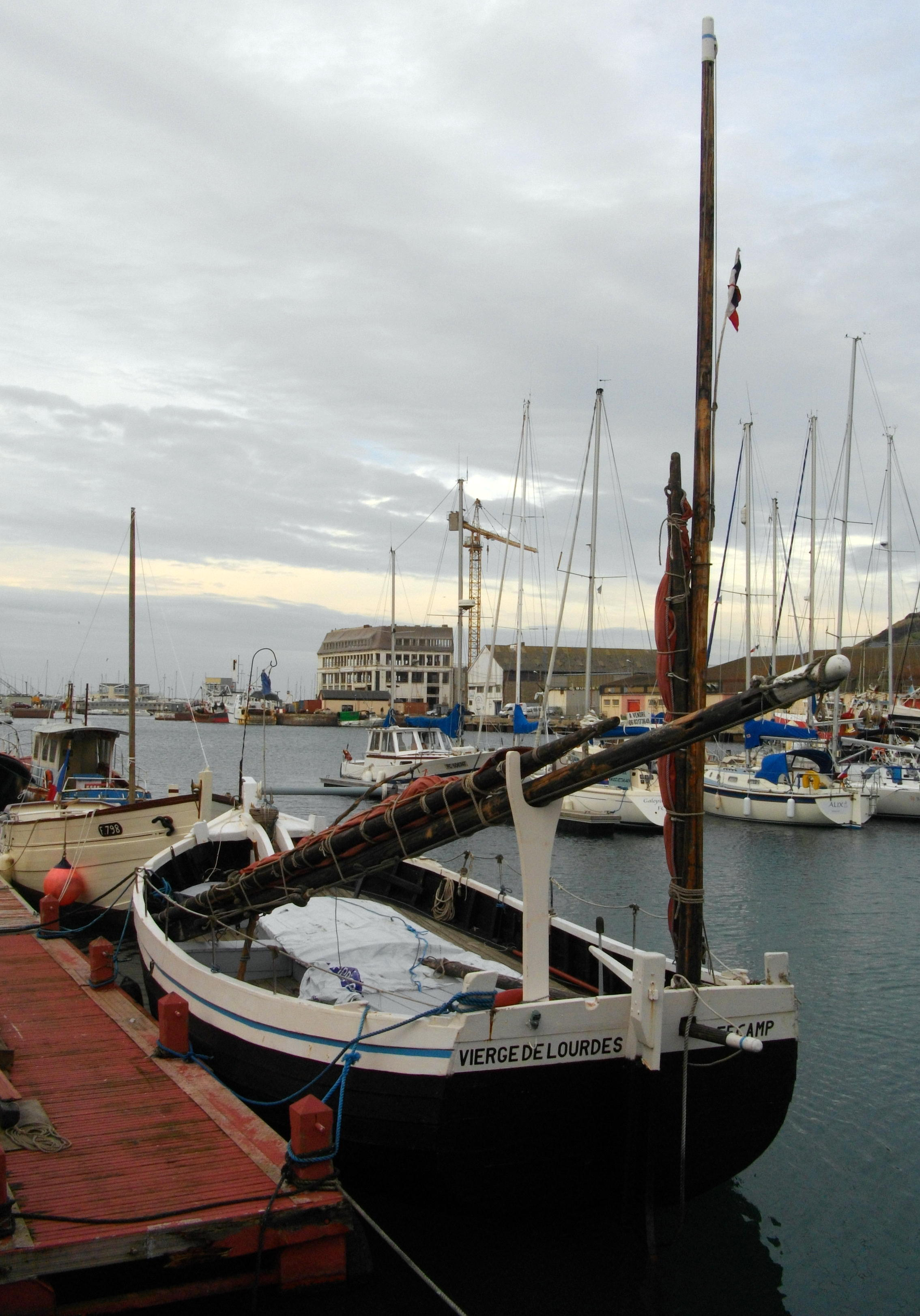 Le caïque Vierge de Lourdes (Port de Fécamp)